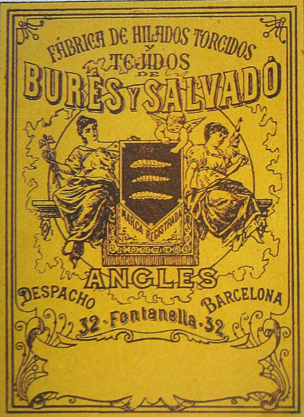 Etiqueta de la fàbrica "Burés i Salvadó"